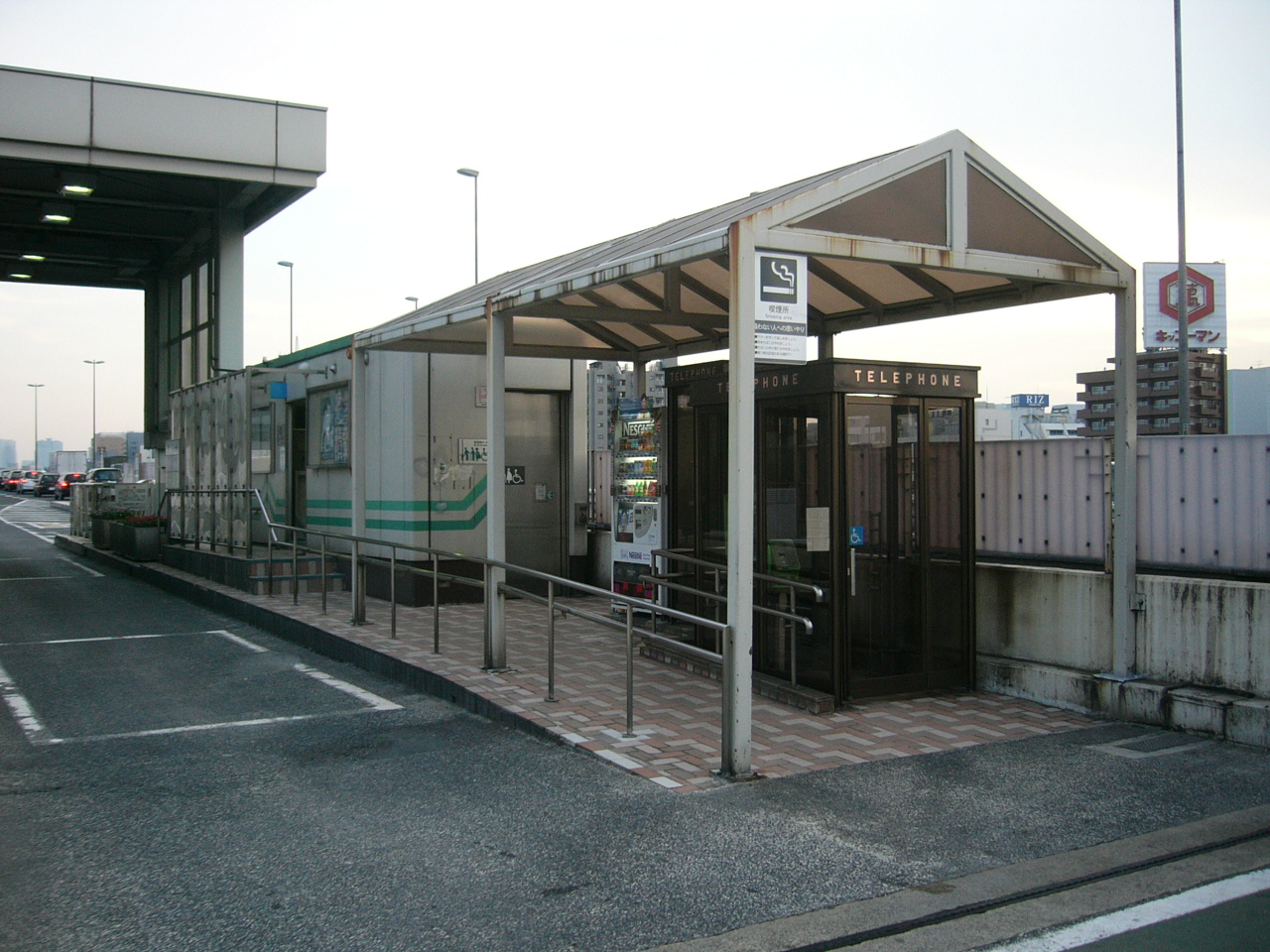 Komagata Parking Area